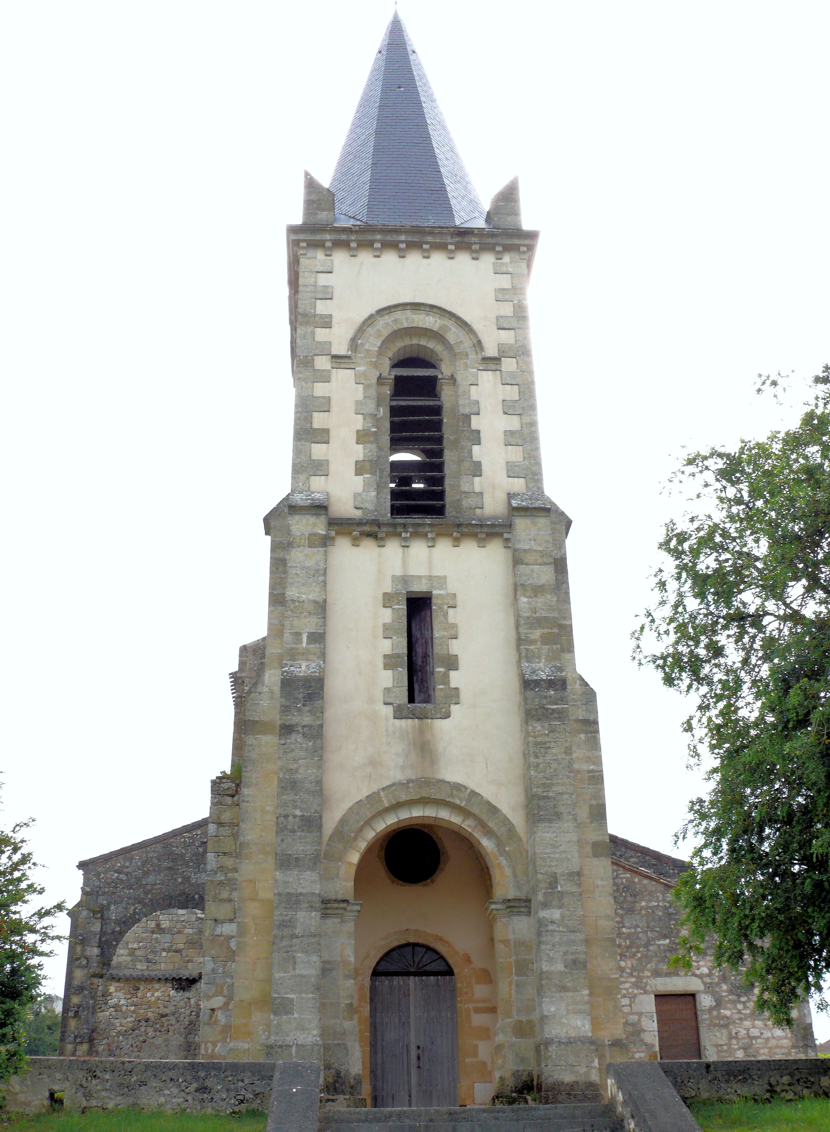 Capdrot - Eglise Notre-Dame-de-l'Assomption - Clocher-porche